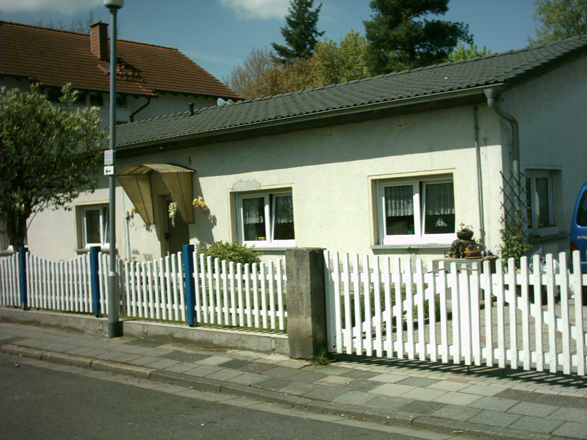 Lager Rollwald, ehemaliges Arresthaus Quelle: selbst Fotograf/Zeichner: presse03 Datum: 2. Mai.2006